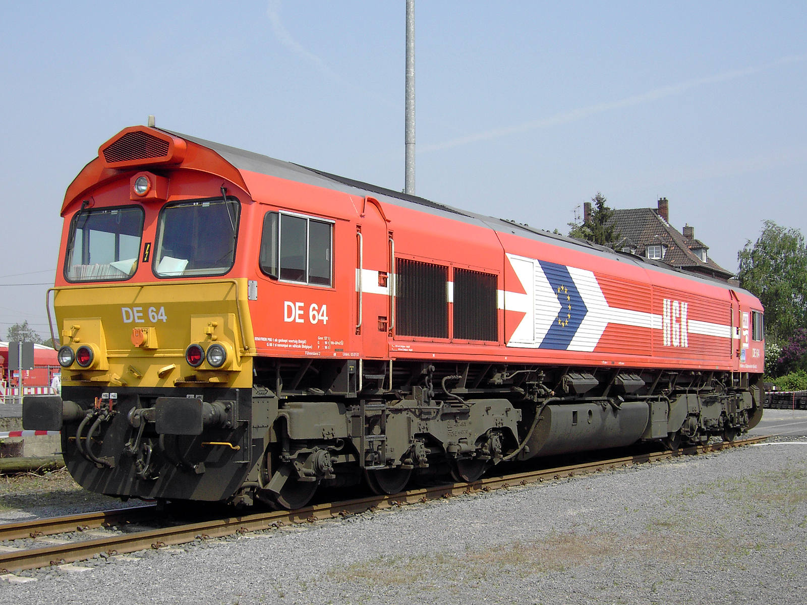 Class 66-Lokomotive DE 64 der HGK im Godorfer Hafen